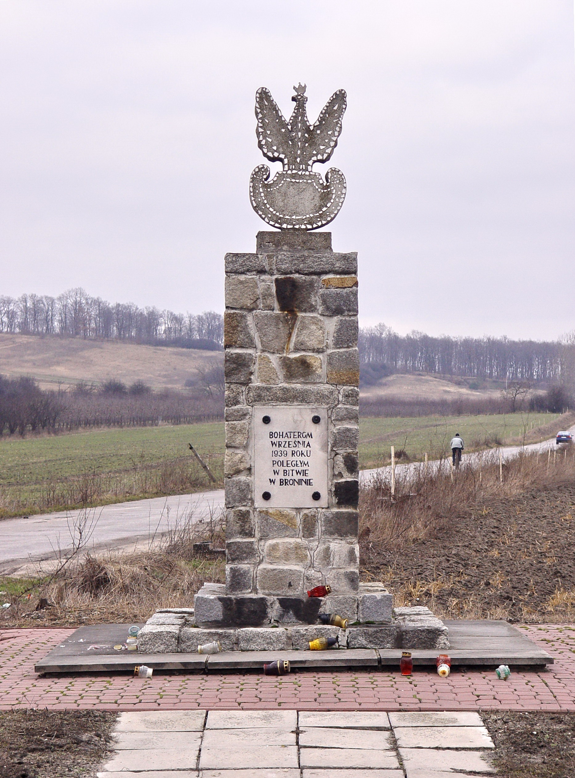 Pomnik upamiętniający bitwę 22 Dywizji Piechoty Górskiej stoczoną tu podczas kampanii wrześniowej 9 września 1939 r. z wojskami niemieckimi. (wikimapia: )